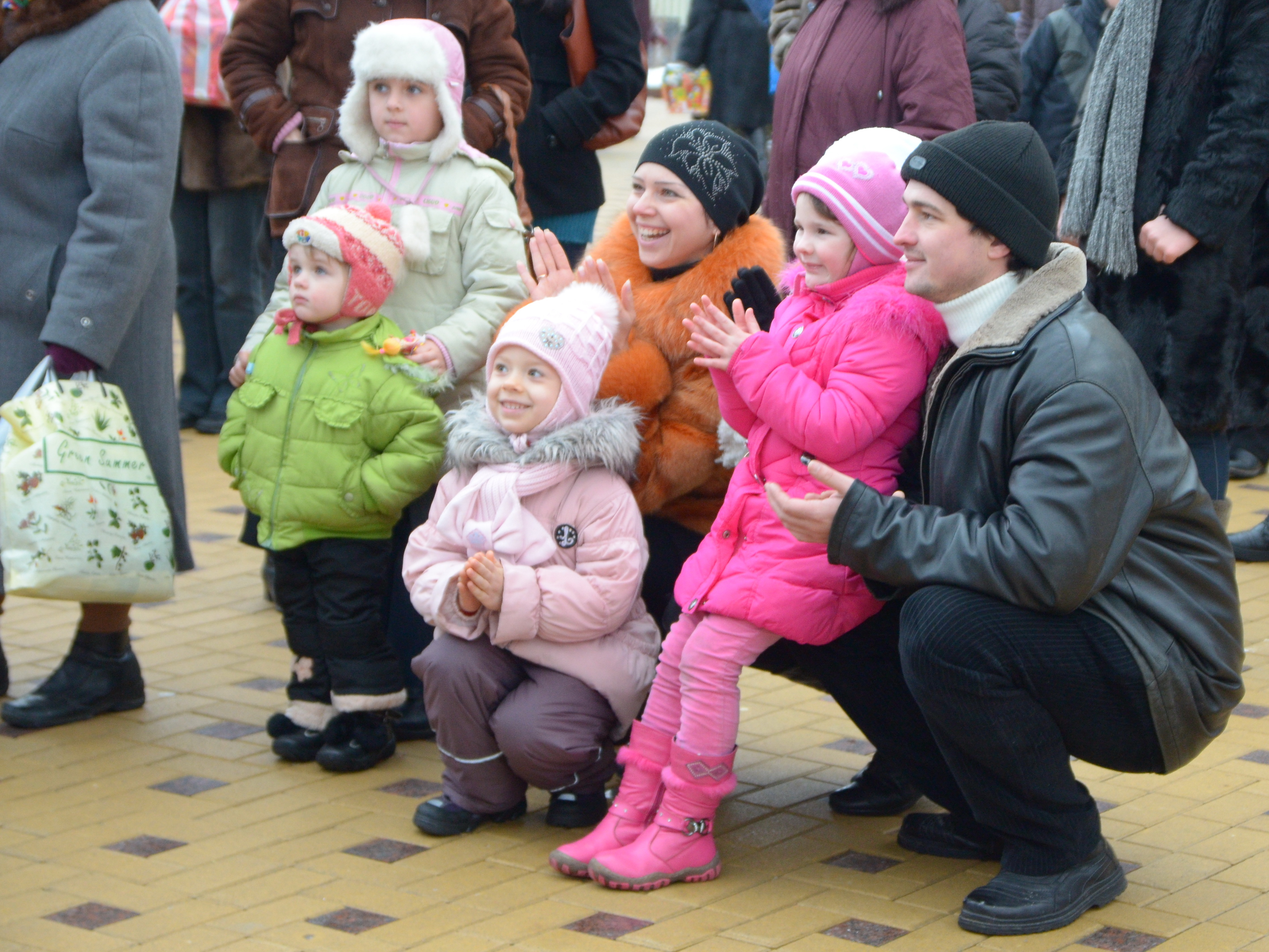 Донецк.